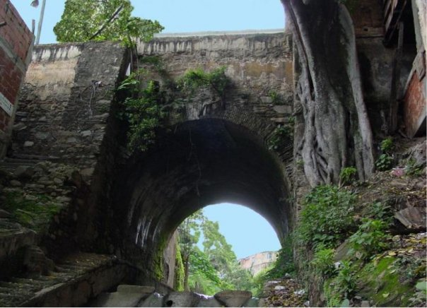 Puente Carlos III sobre el curso de Río Catuche (cerca de 1772), en Caracas Venezuela